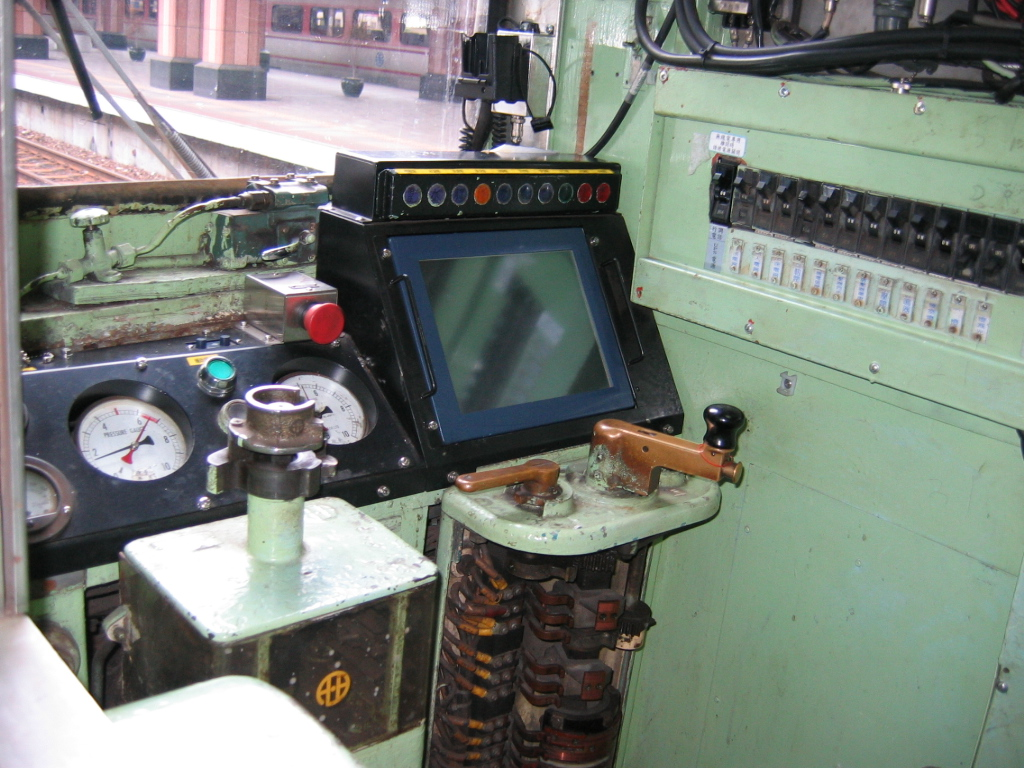 中文（台灣）: 台鐵DR2700型柴油車駕駛台。